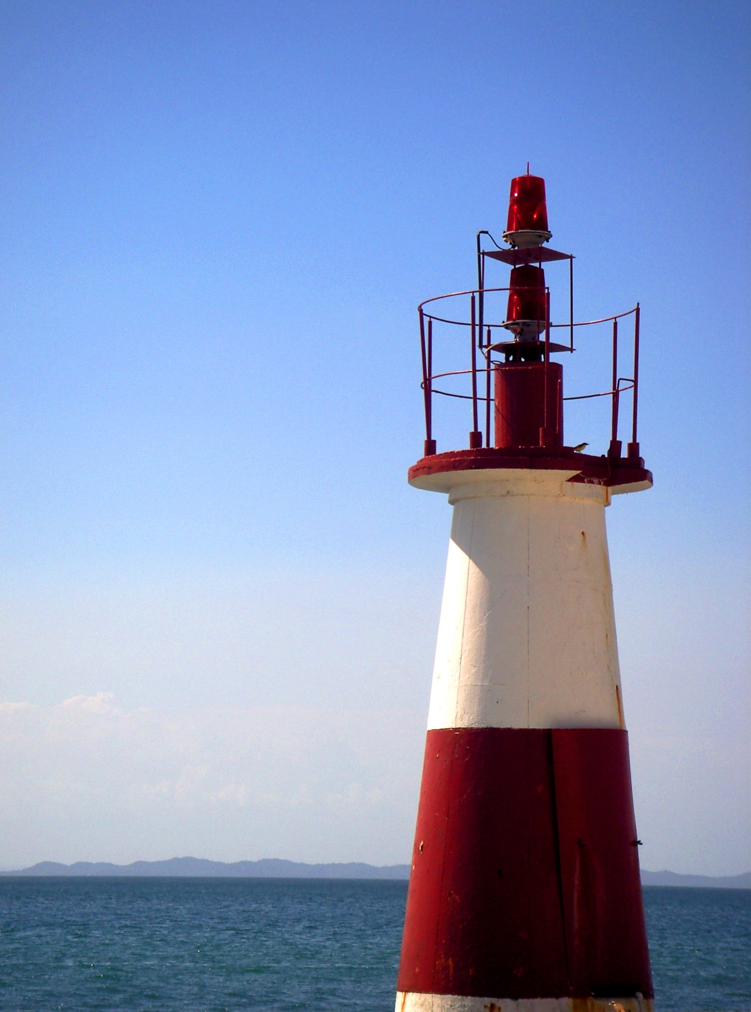 Monte Serrat Lighth, at Humaitá point, São Salvador, Bahia, Brazil.